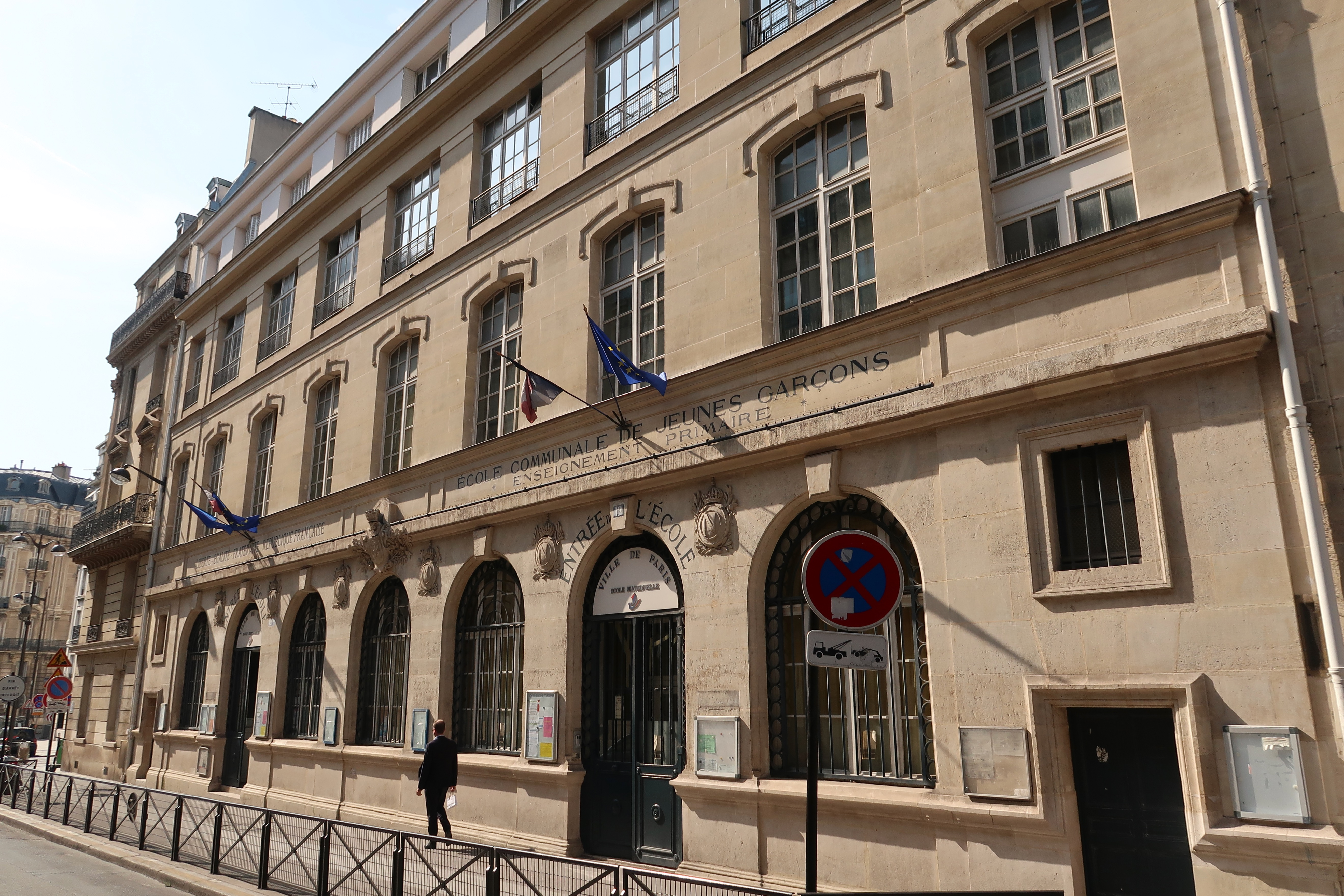 École élémentaire, 12 rue de la Bienfaisance (Paris, 8e).